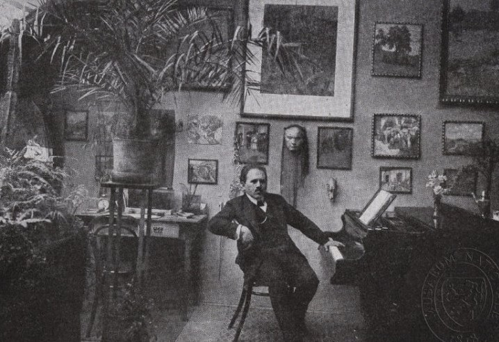 Ak. mal. František Horký, český malíř a grafik.